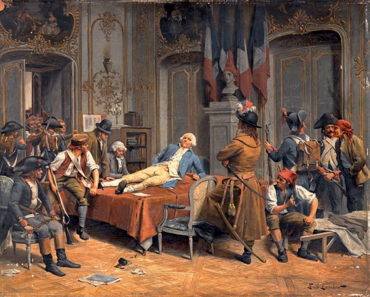 André Émile Larcher (actif vers 1879 – 1896), Robespierre (53,5 x 65 cm).